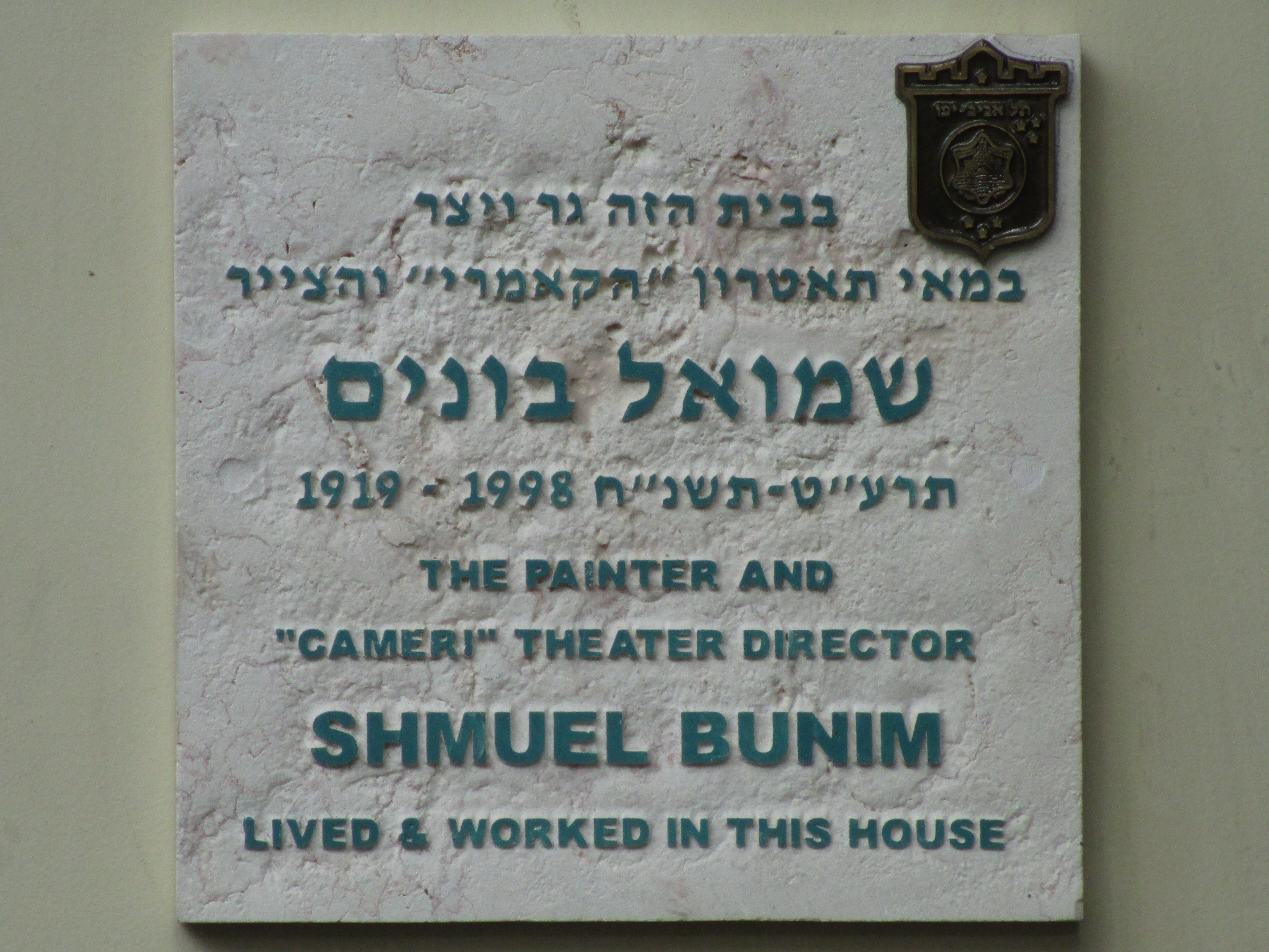 לוחית זיכרון לבמאי שמואל בונים על ביתו ברח' גרץ 9 בתל אביב